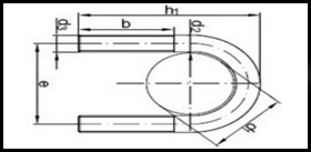 DIN 3570